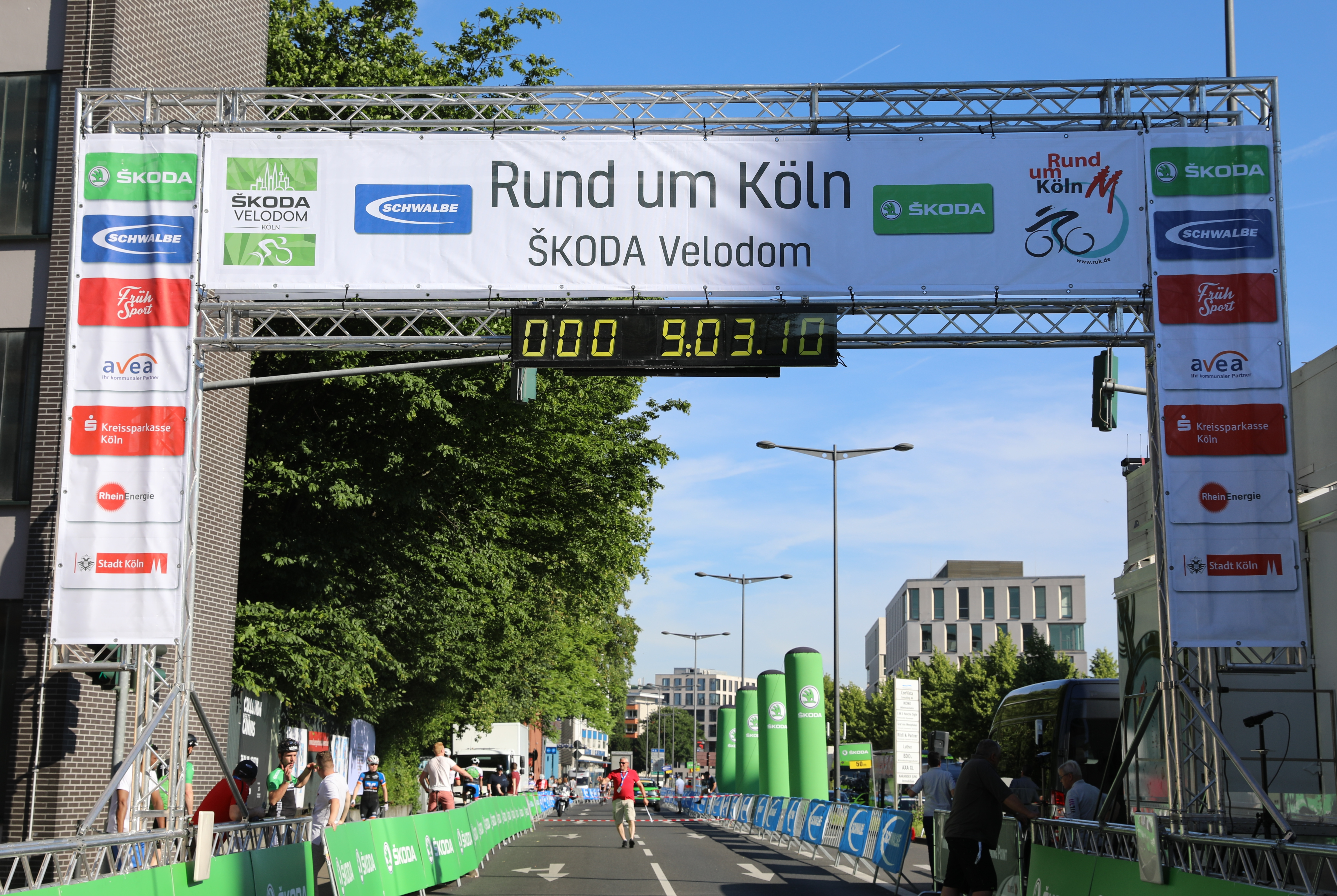 Skoda Velodom - vor dem Start